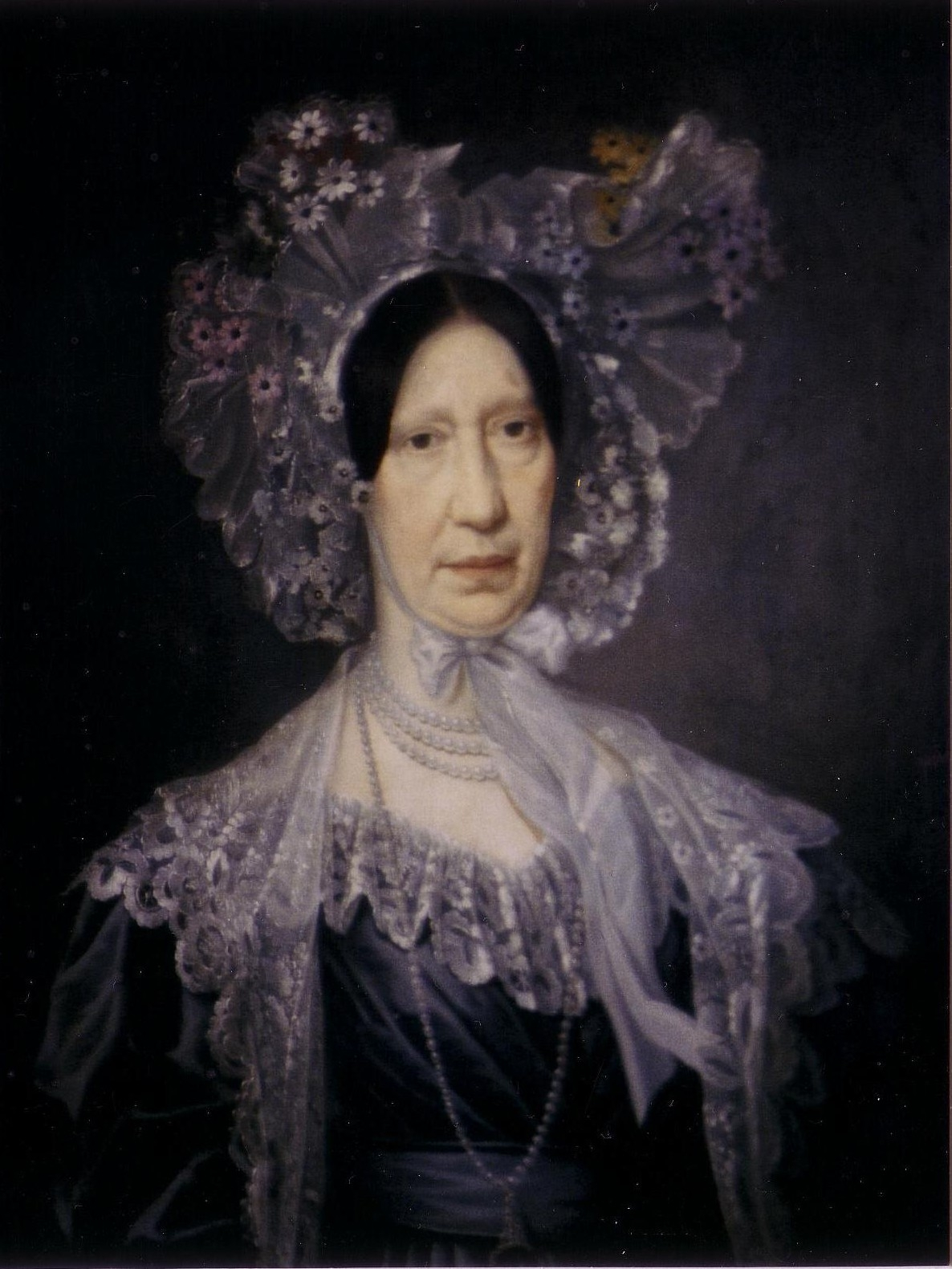 Wilhelmine (Mina) Ladenburg, nee Lorch (1770-1855, Mannheim, Germany)